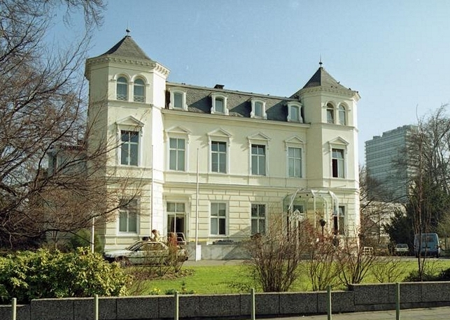 14.03.1991 Bonn - Regierungsviertel Haus der Deutschen Parlamentarischen Gesellschaft in der Dahlmannstraße